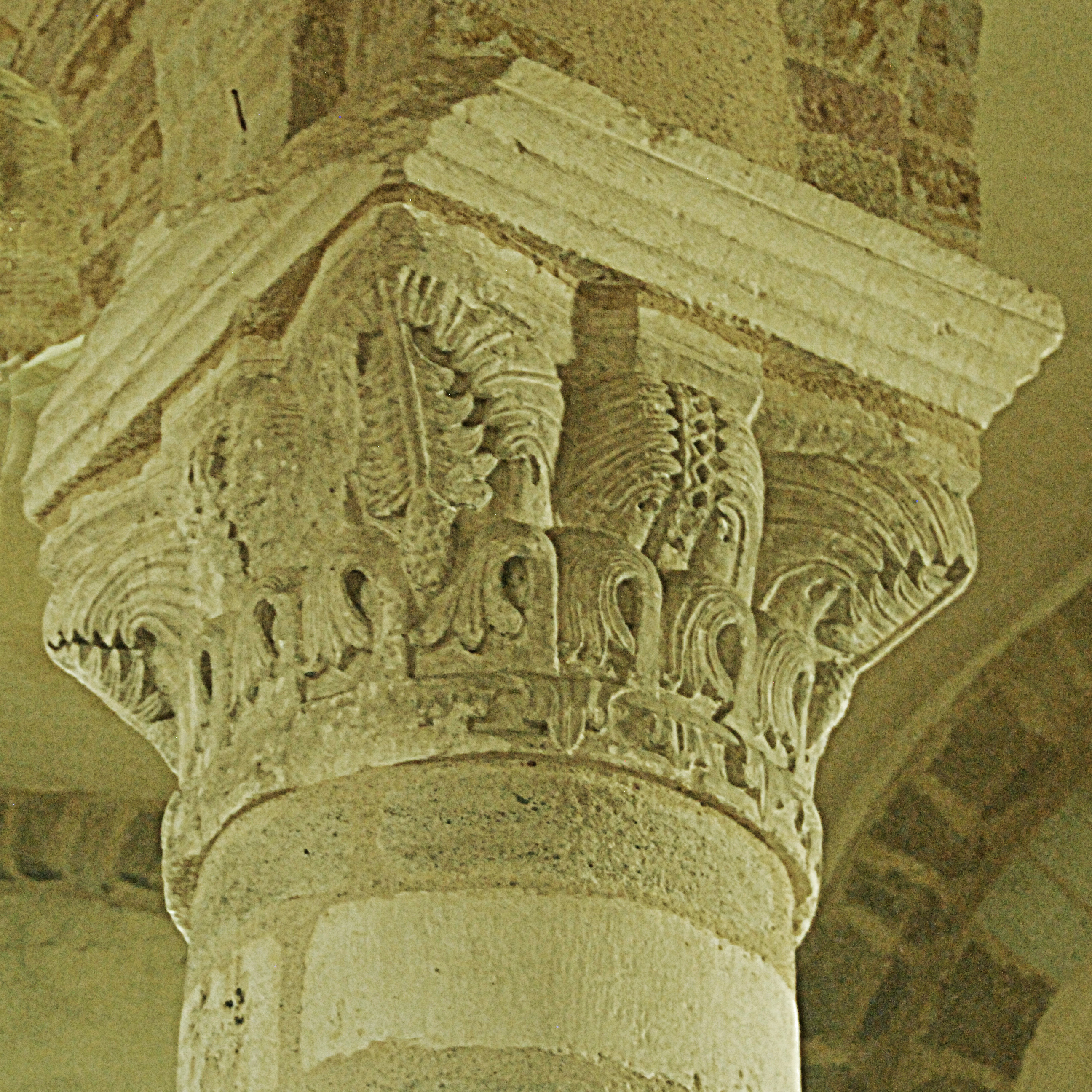 Neuvy_St.-Sépulcre, Rotunde, Kapitell, pflanzliche Skulptur